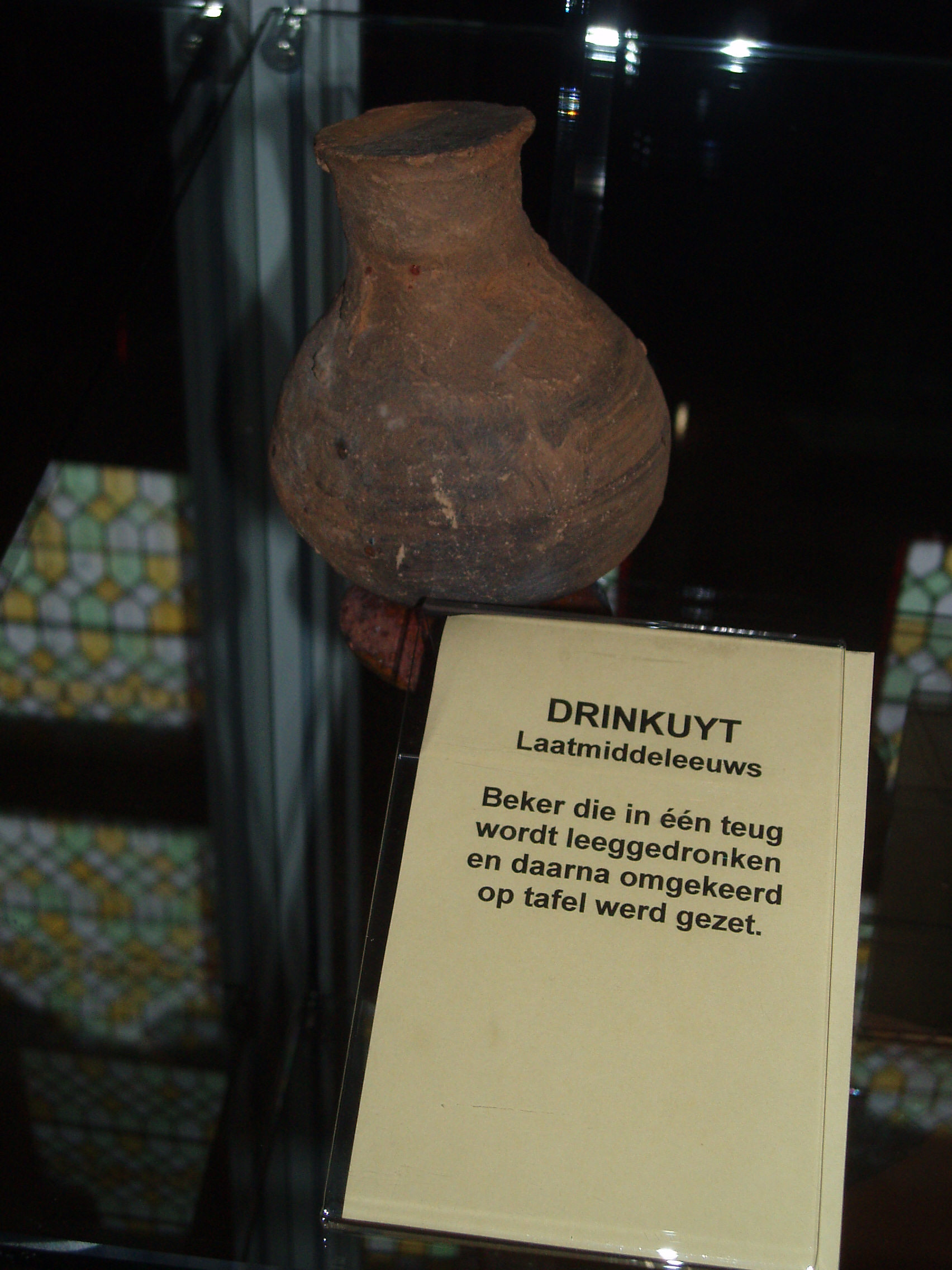 Drinkuyt in museum van Zoutleeuw (stadhuis)